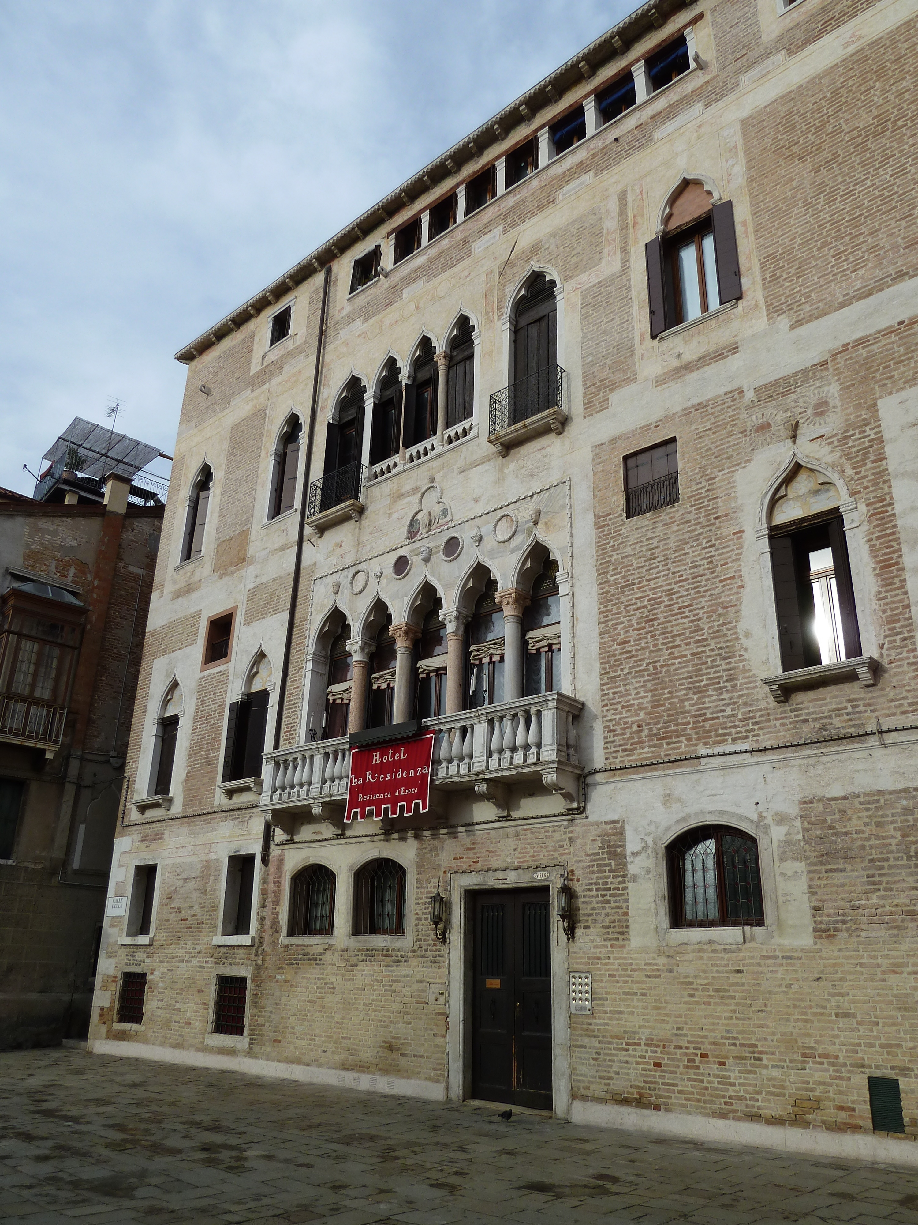 Palazzo Gritti Morosini Badoer (Venice)